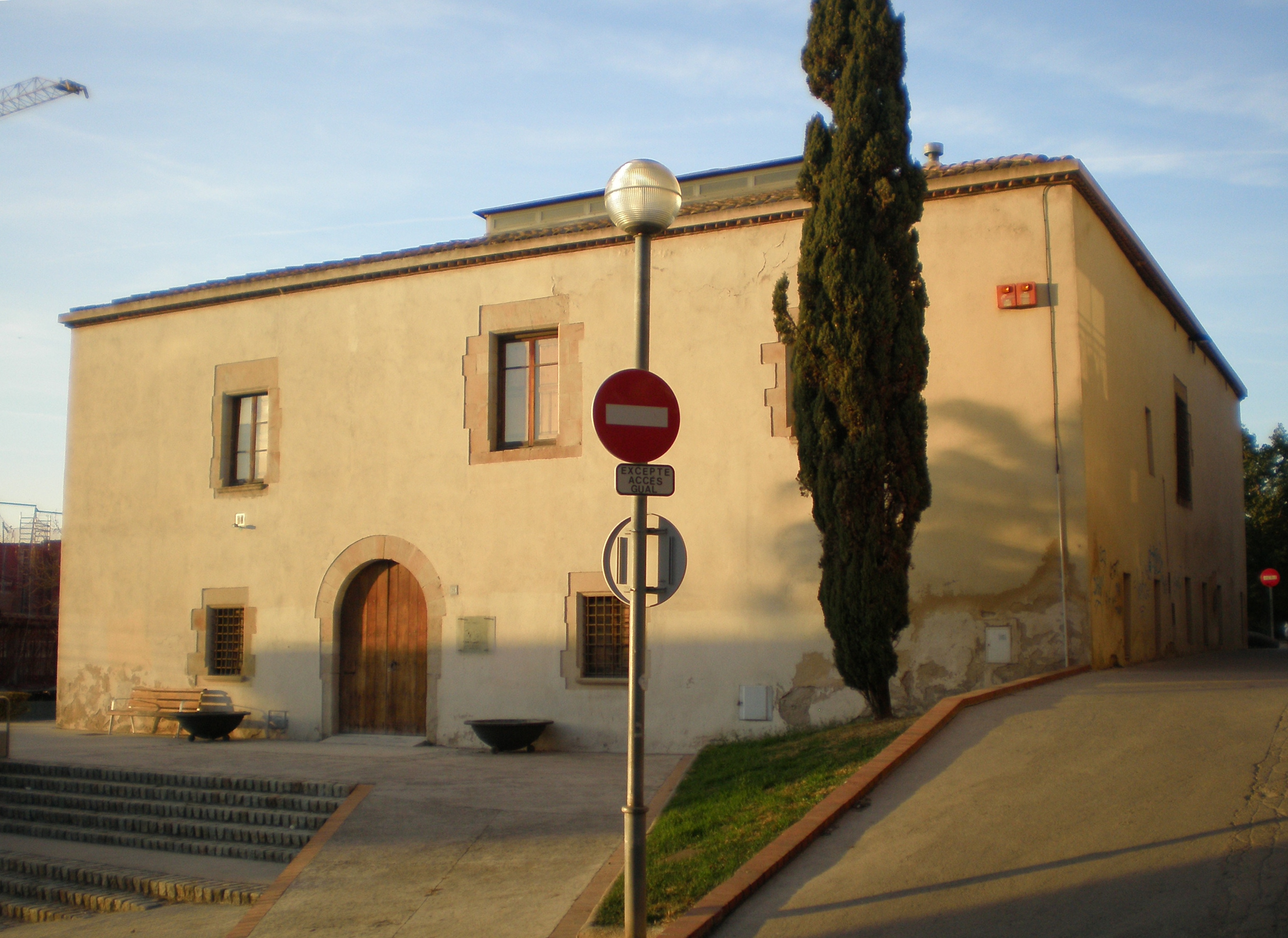 Mollet del Vallès: Masia de Can Lledó.